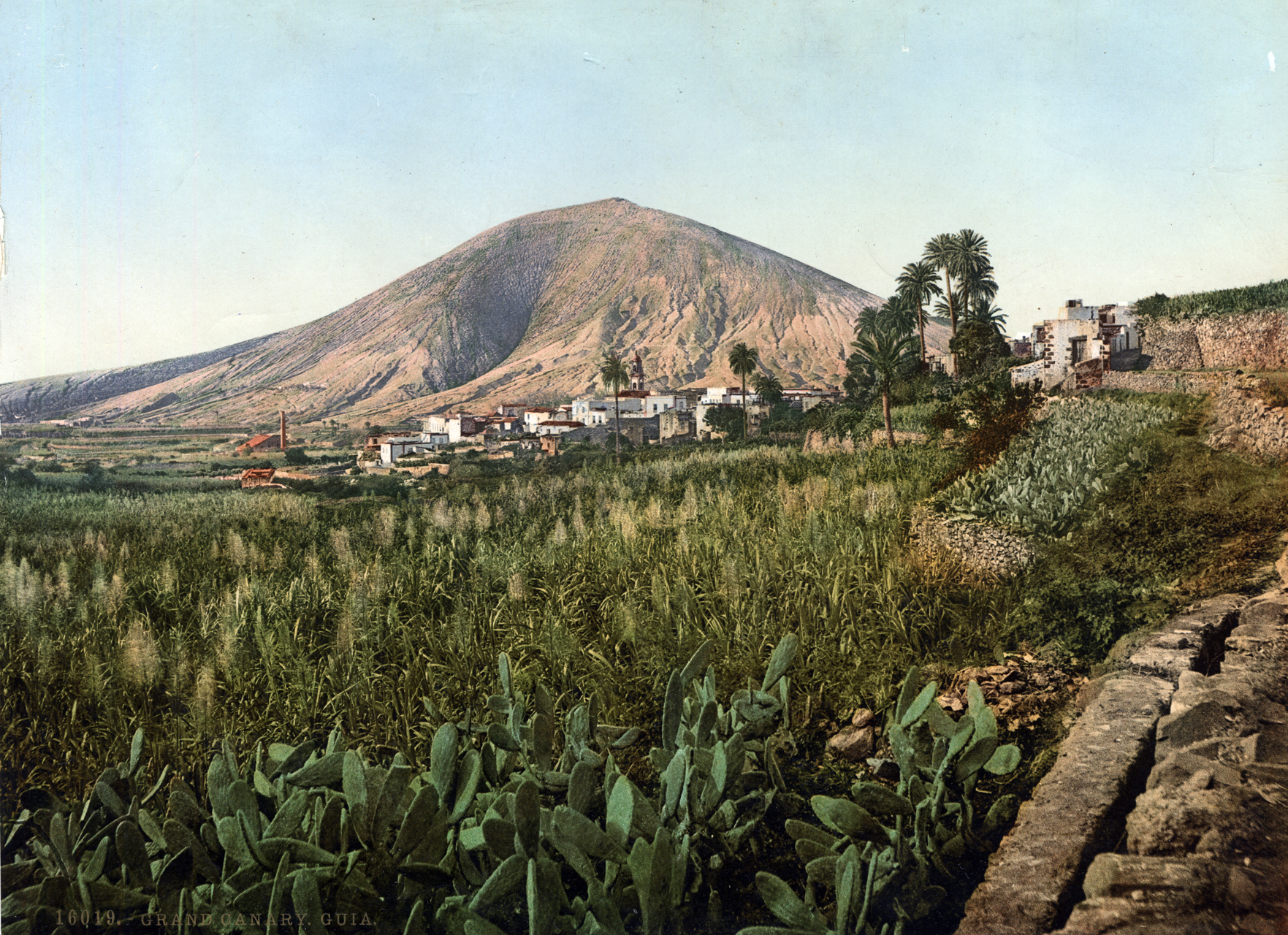 Montaña de Gáldar en 1893, sin apenas antropización